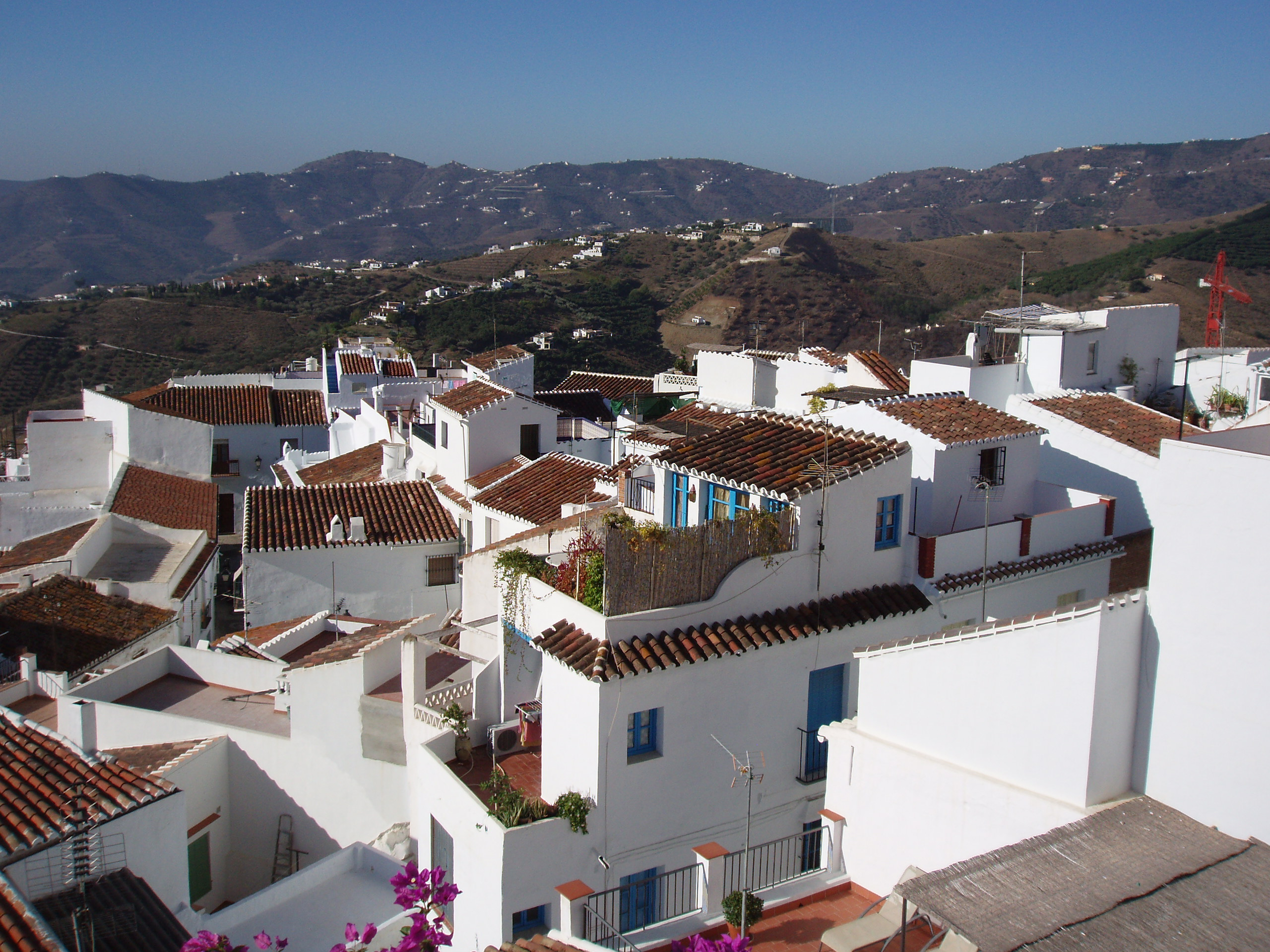 Impressions of Frigiliana (Málaga) in Andalucía, (España)